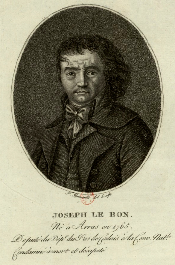 Joseph Le Bon : né à Arras en 1765, député du dép.t du Pas de Calais à la Conv. nat.le condamné à mort et décapité (estampe).